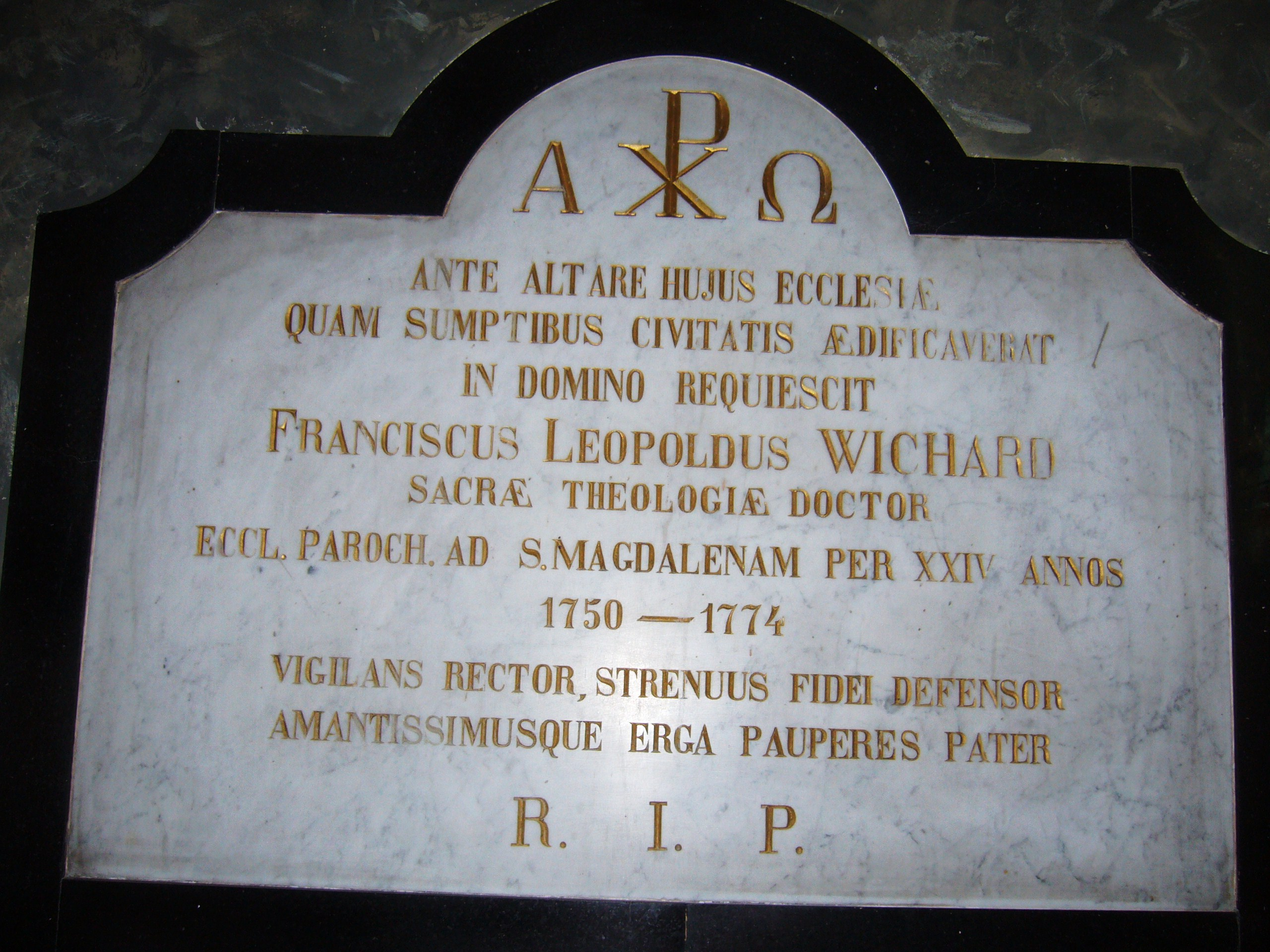 Dalle funéraire de encastrée au chœur de l'église